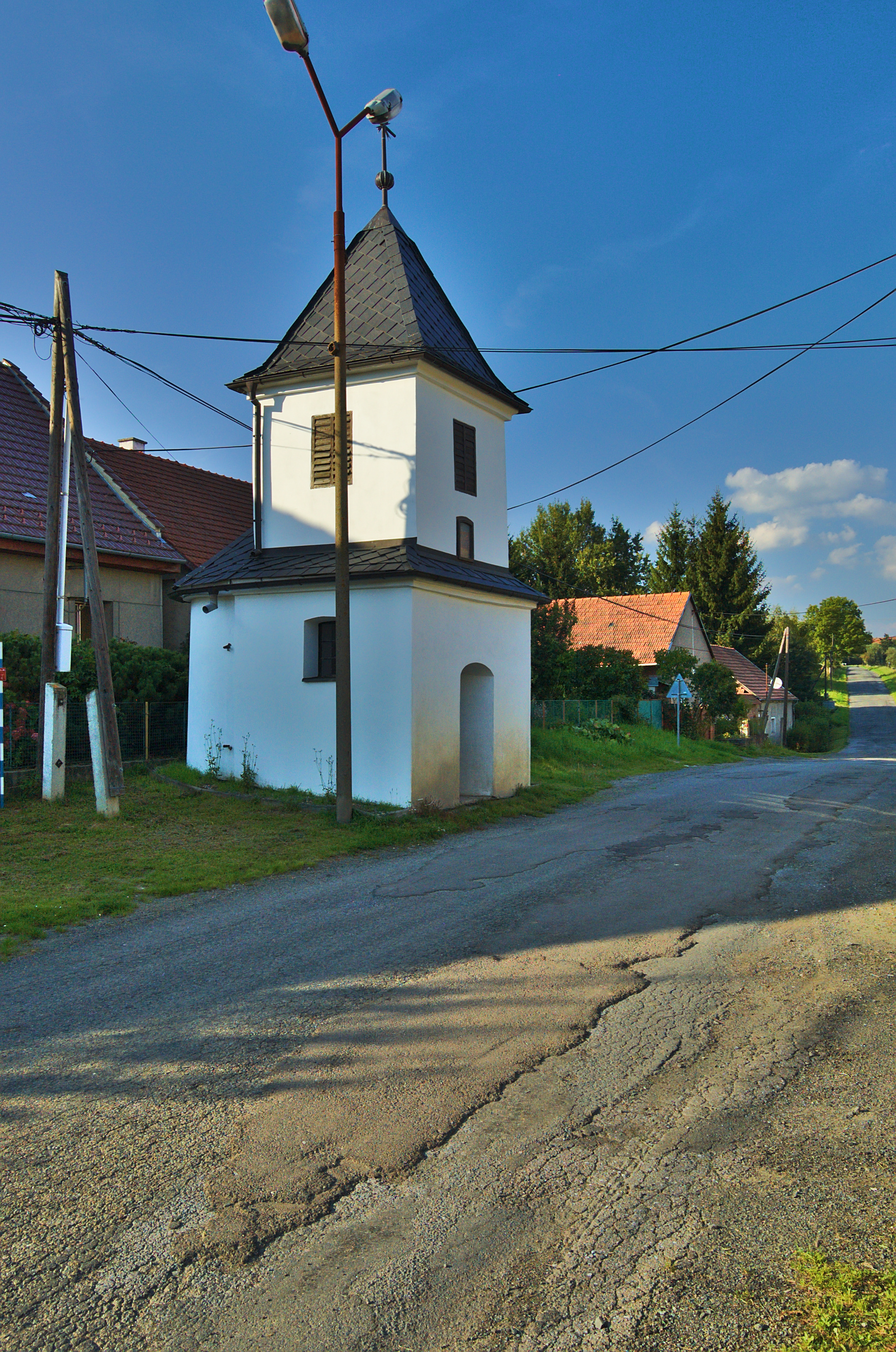 Kaple svatého Gottharda, Růžov, Stražisko, okres Prostějov